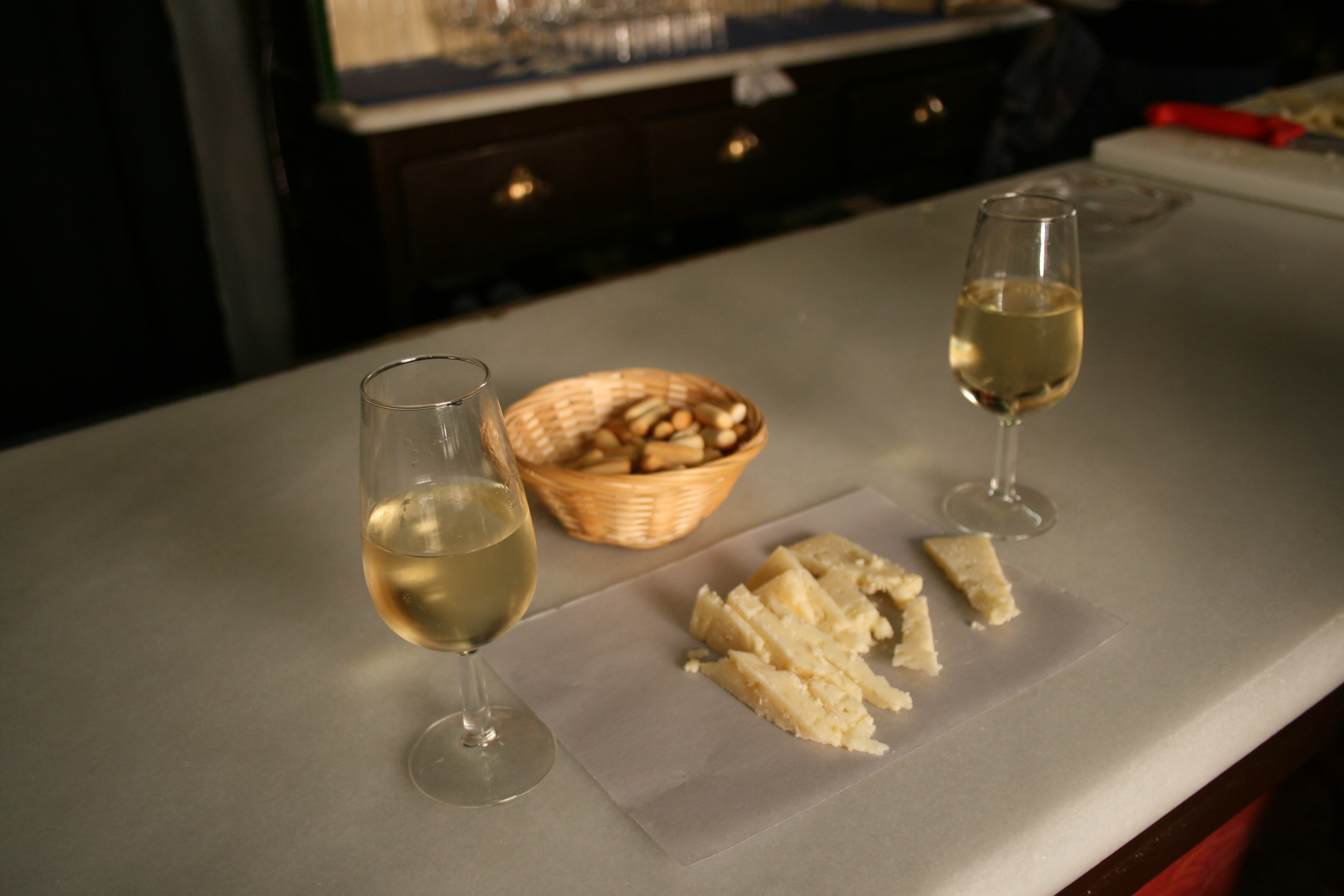 Dos copas de Fino y sus tapas en el "Manteca"